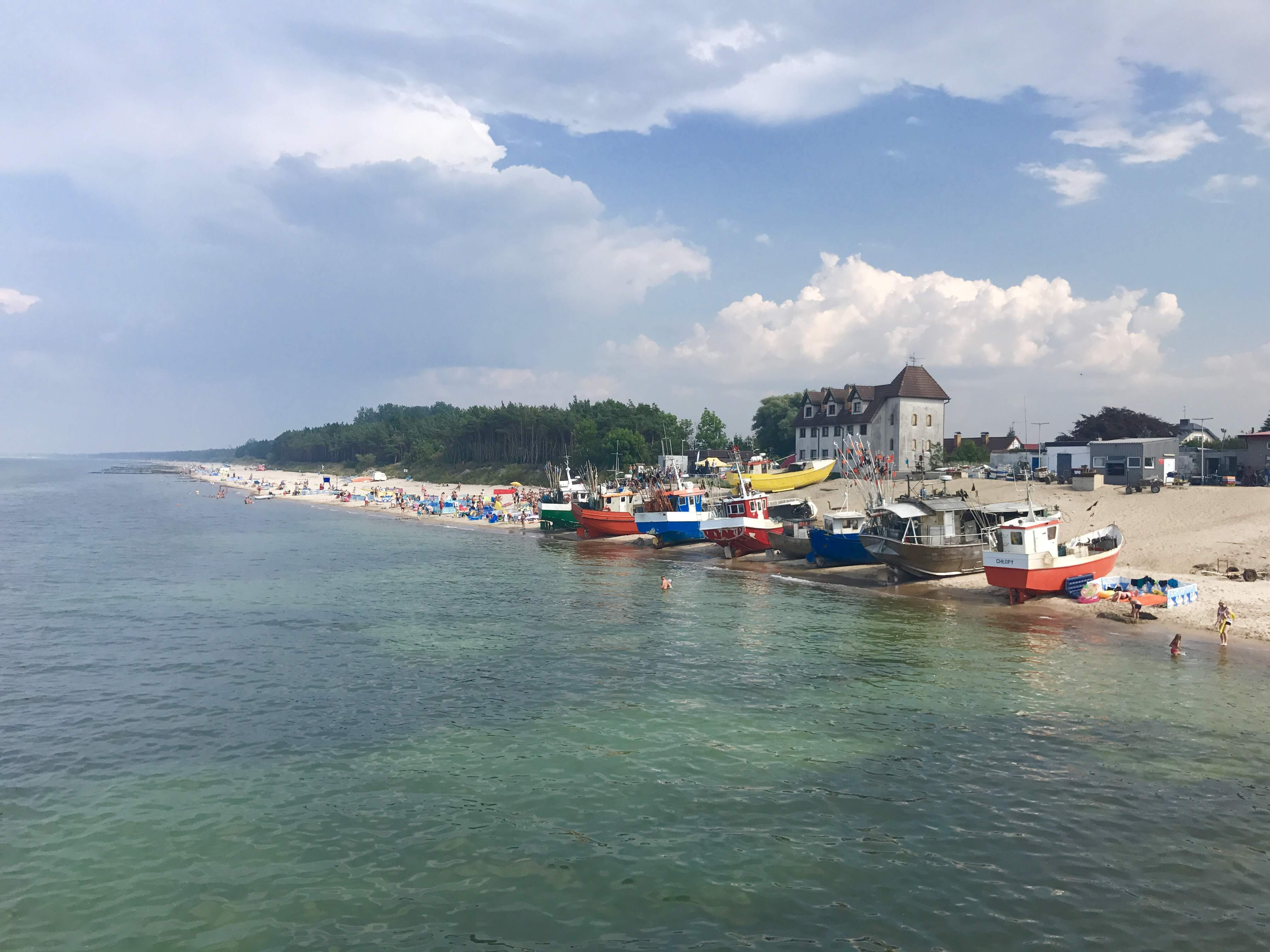 Plage à Chlopy, Pologne. Mer baltique. Vue du port